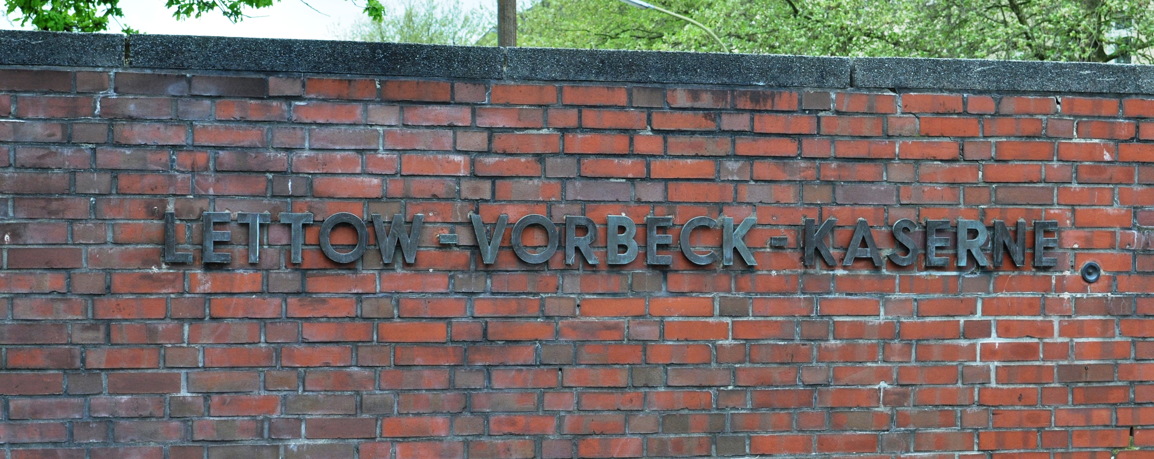 Schriftzug am Eingang der ehemaligen Lettow-Vorbeck-Kaserne in Hamburg-Jenfeld.